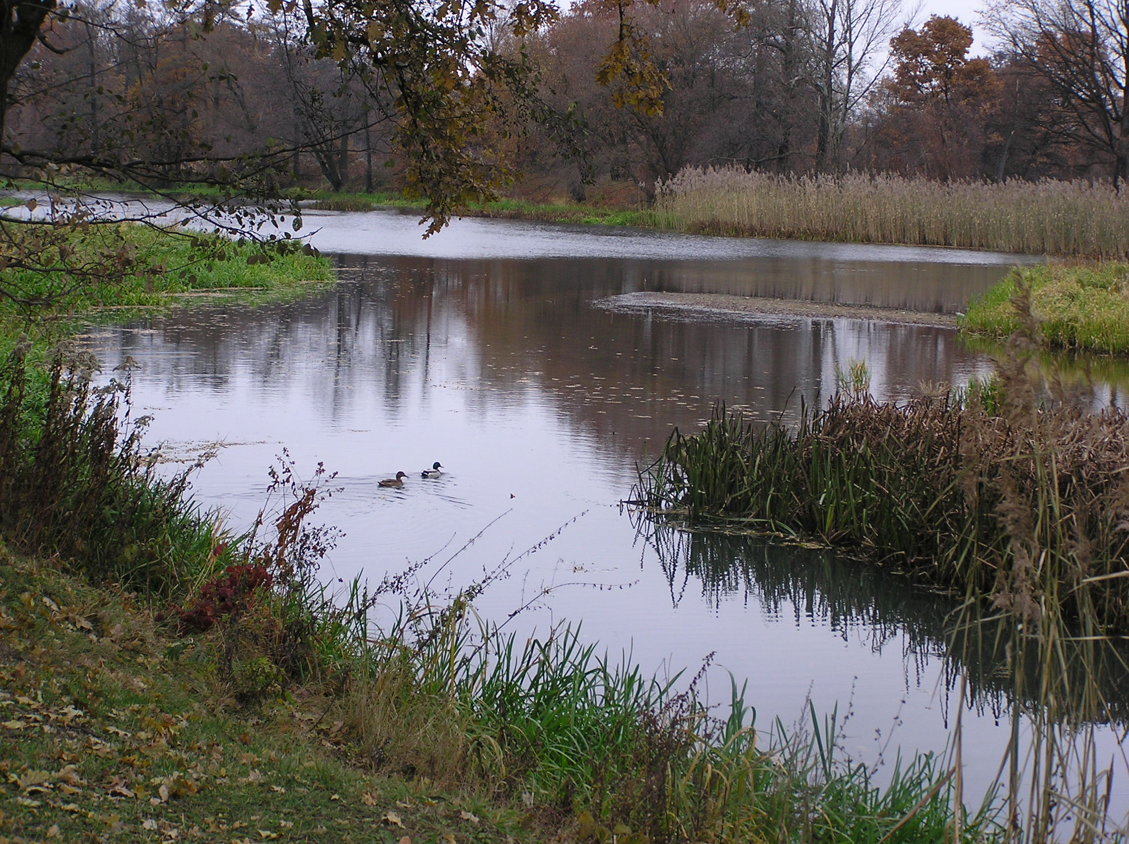 Wrocław, Park Wschodni, rzeka Dolna Oława